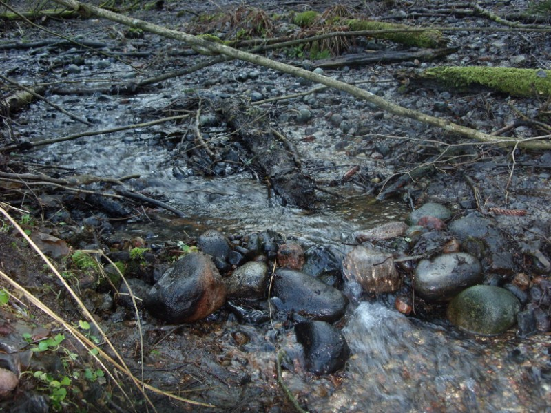 Brynica w okolicach Bryńska